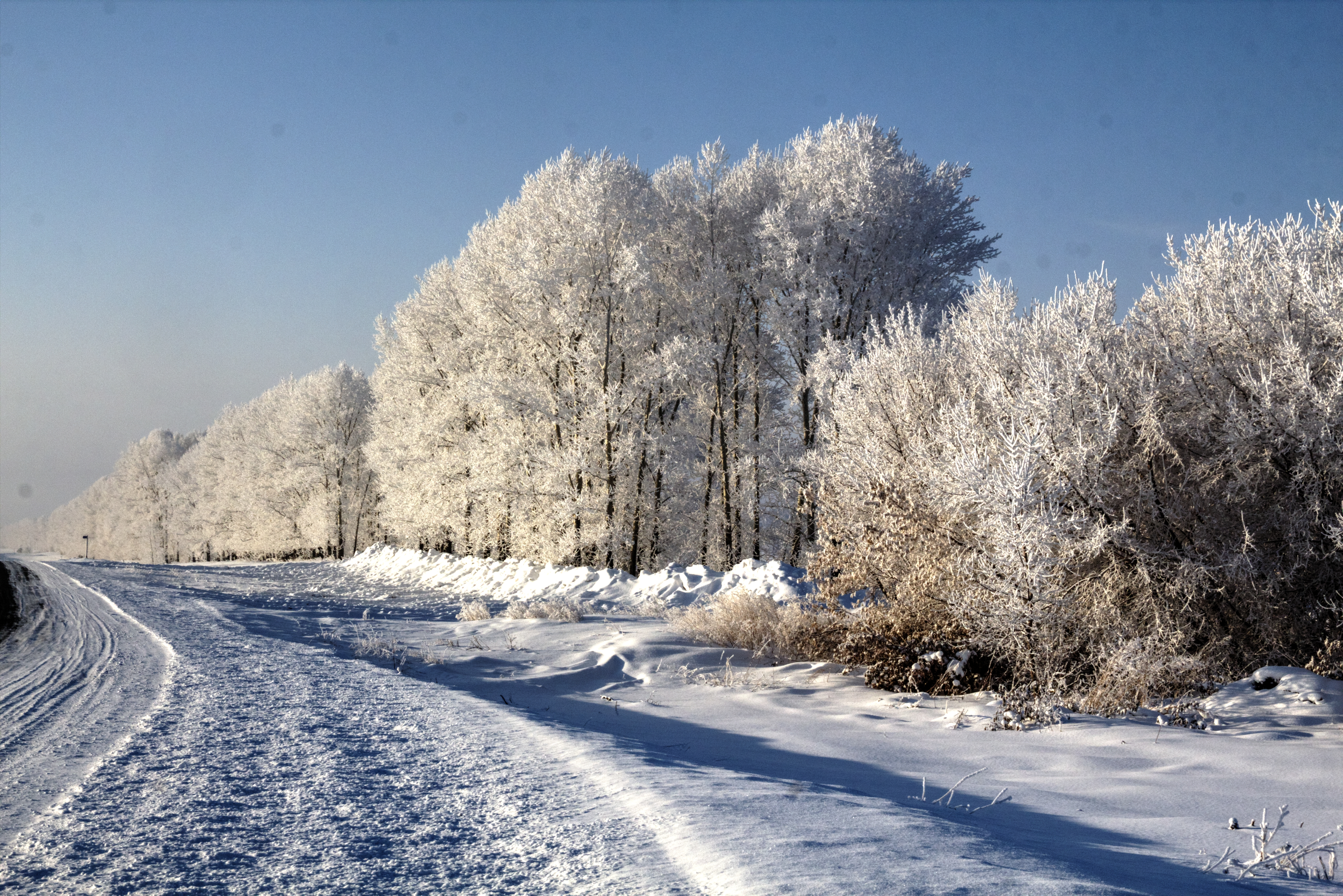 Изморозь 03.01.2019 года в Алтайском крае